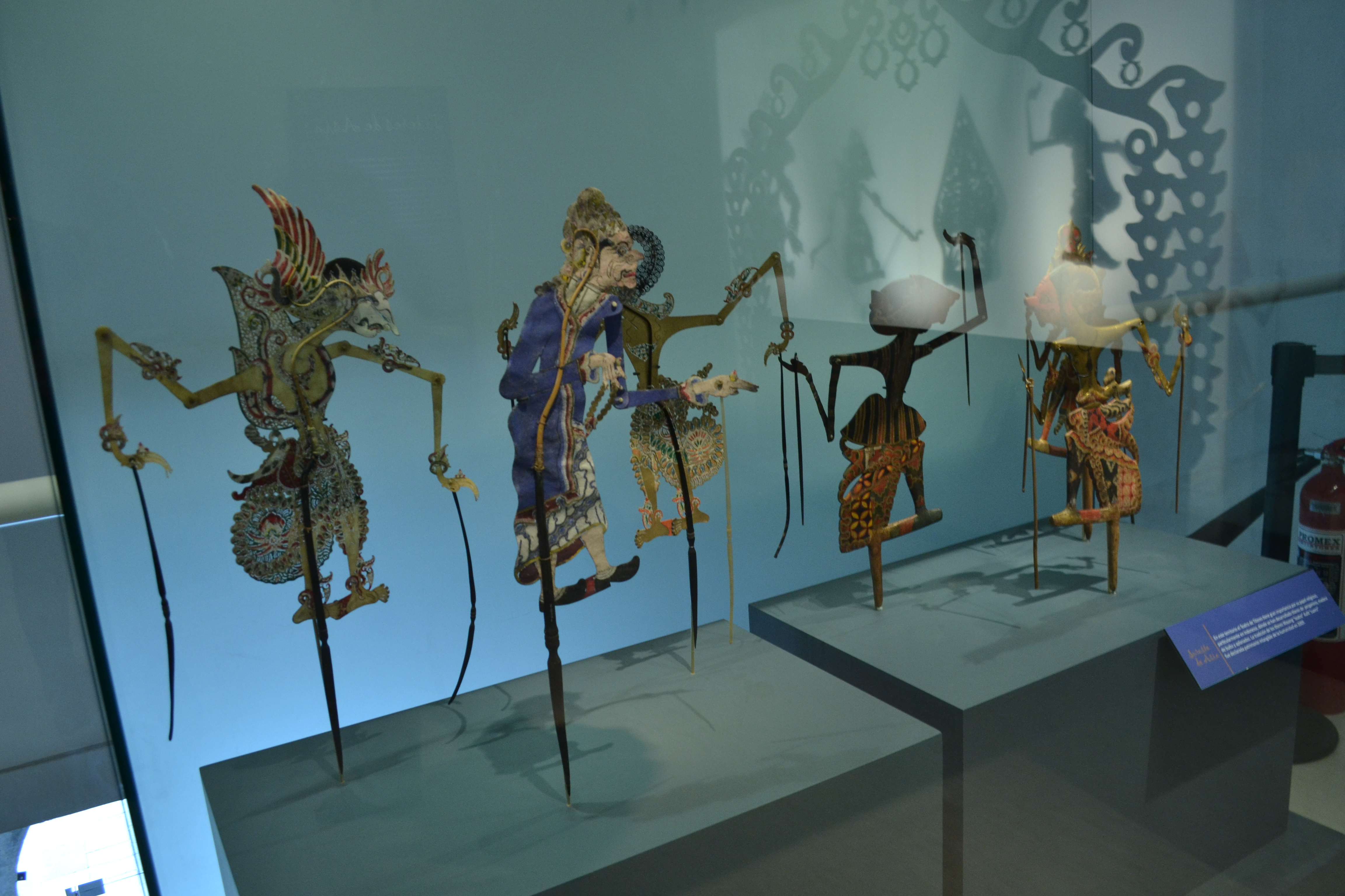 Vitrina en la que se muestran diferentes tipos de títeres